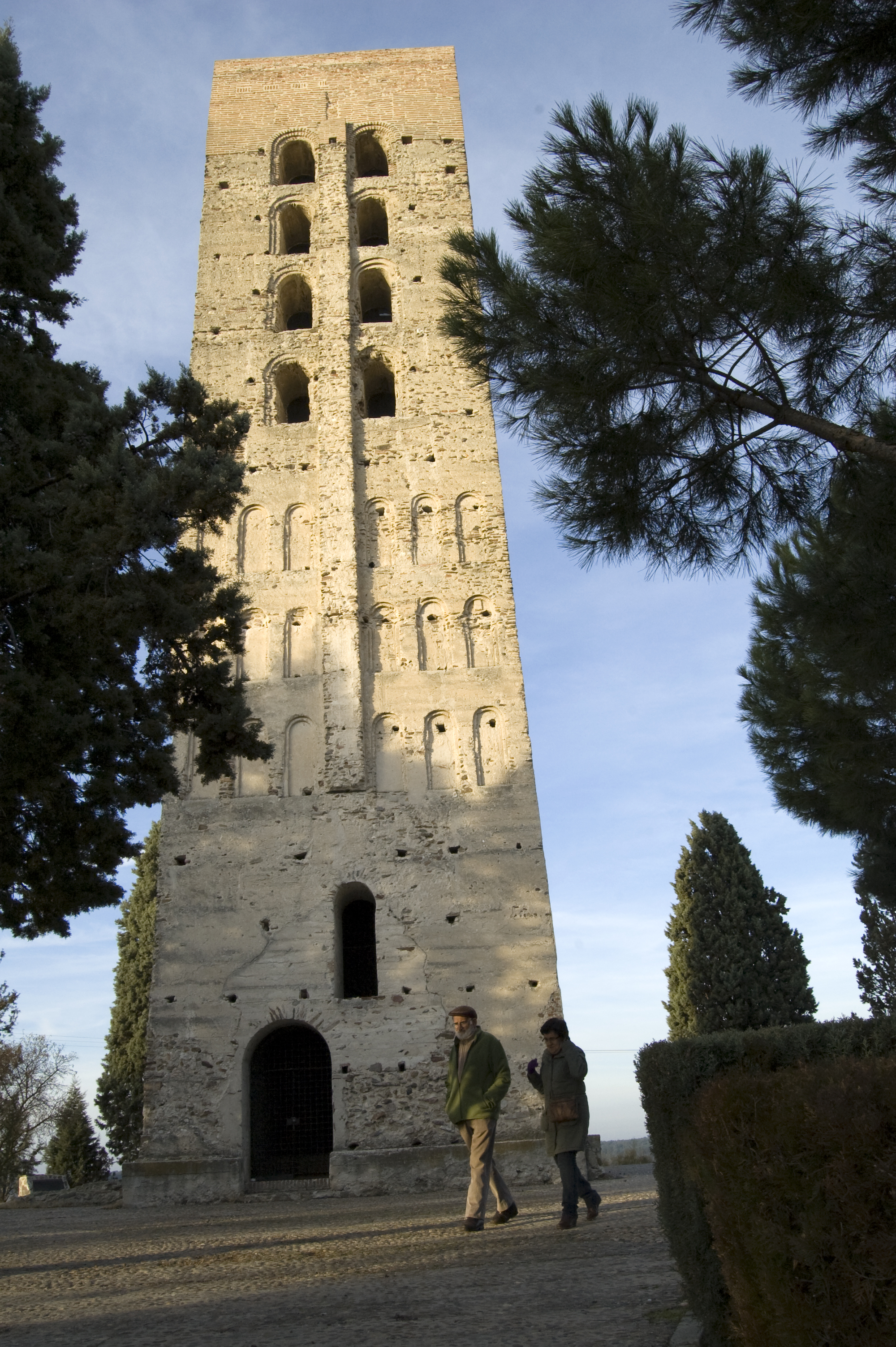 Torre de San Nicolás, Segovia